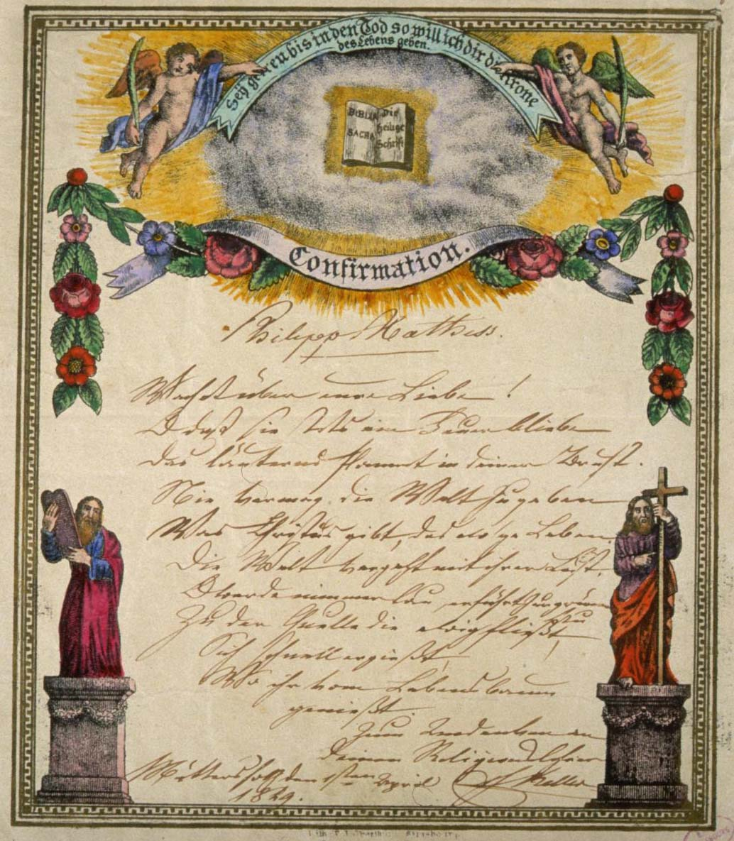 Confirmation. Philipp Mathis... 1. April 1849 : Sey getreu bis in den Tod, so will ich die Krone des Lebens geben... STRASBOURG, Souvenir de confirmation ,de F. J. OBERTHUR, lithogr. (1849)